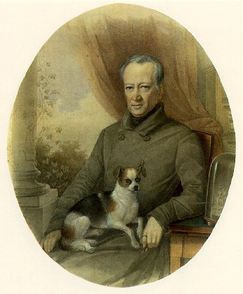 Modest Andreevich Korf (1800-1872)